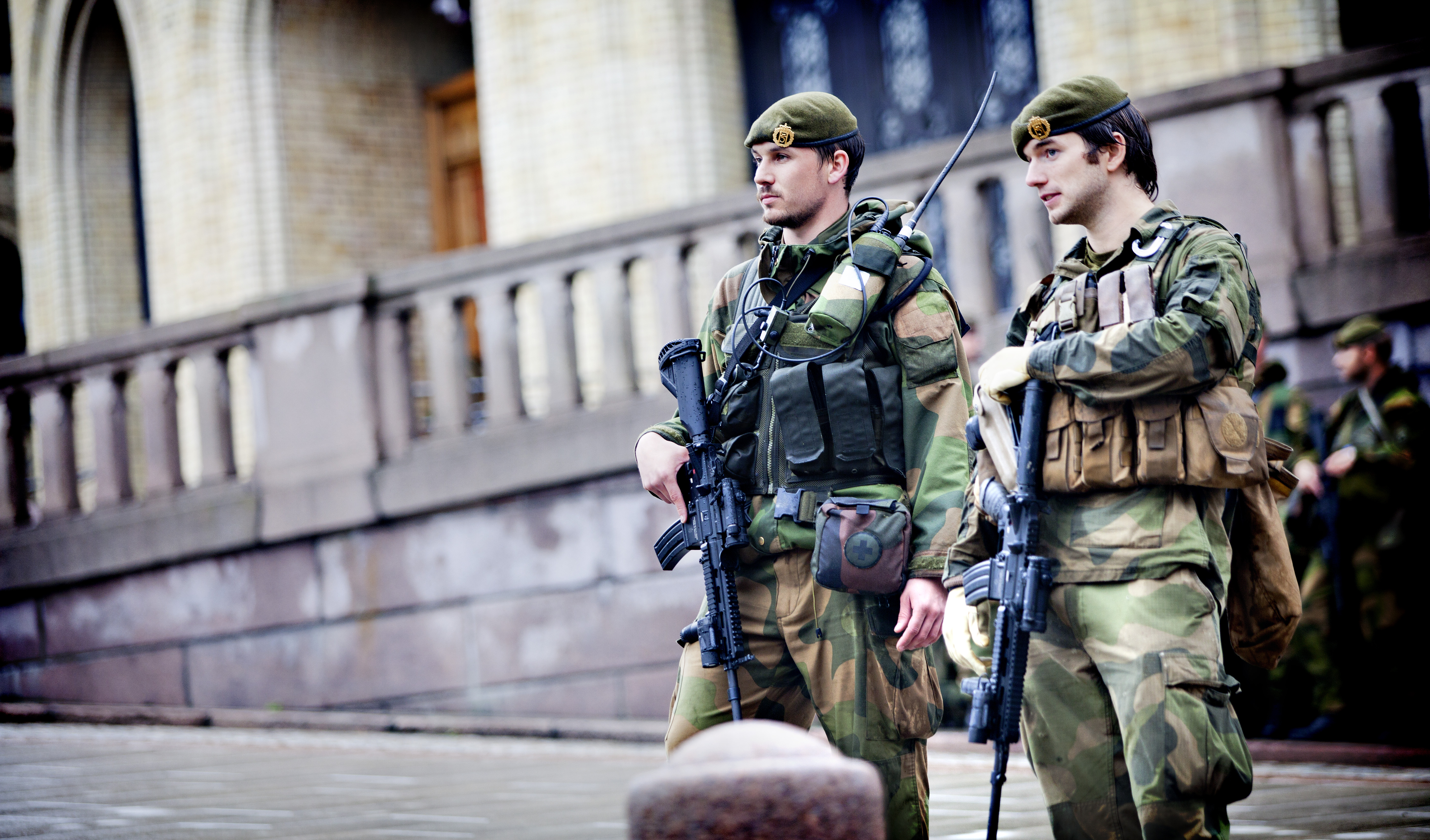 Væpnede soldater fra Heimevernet voktet Stortinget etter terrorangrepet mot Oslo i 2011